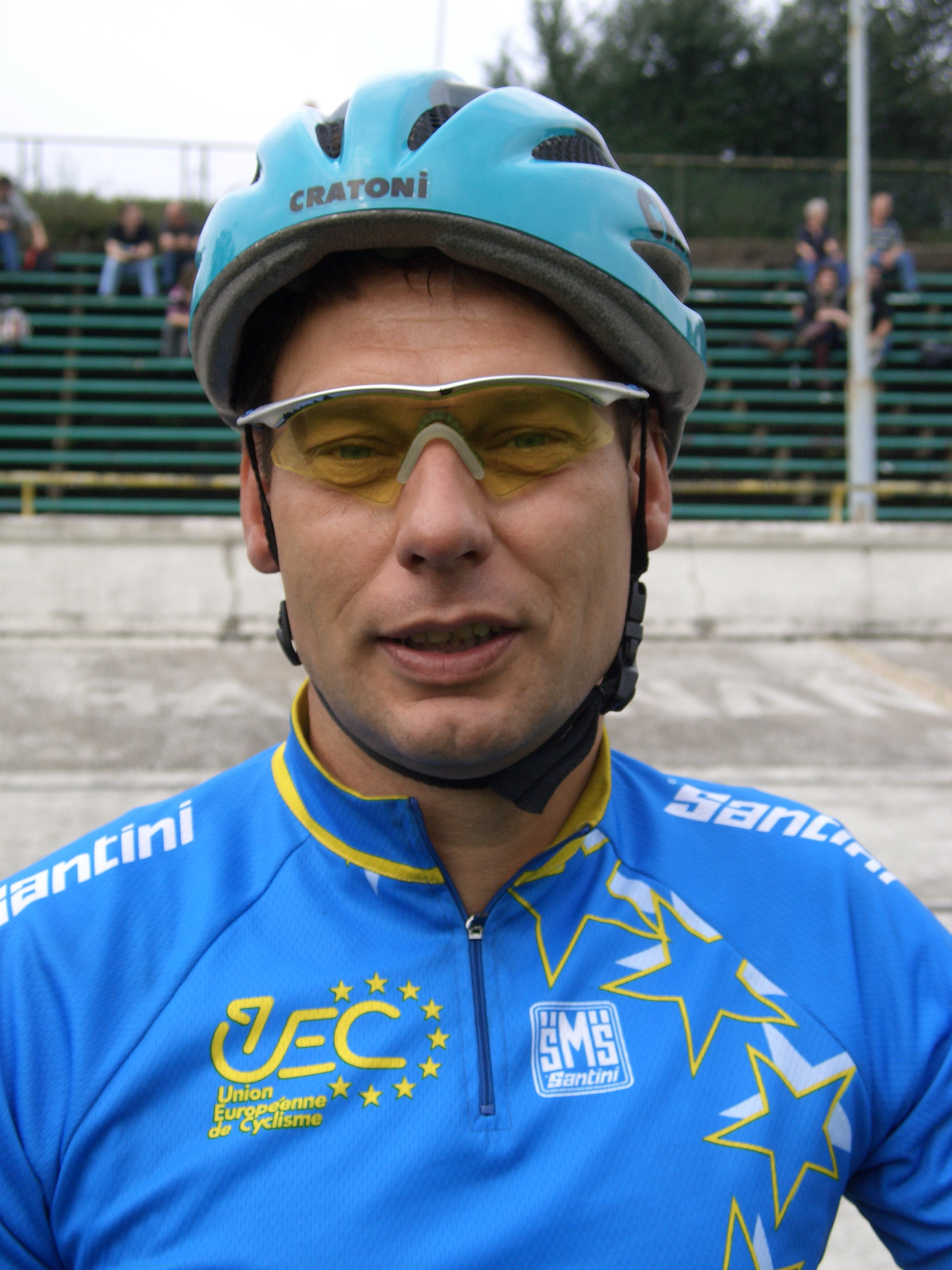 Thorsten Rellensmann, deutscher Radrennfahrer